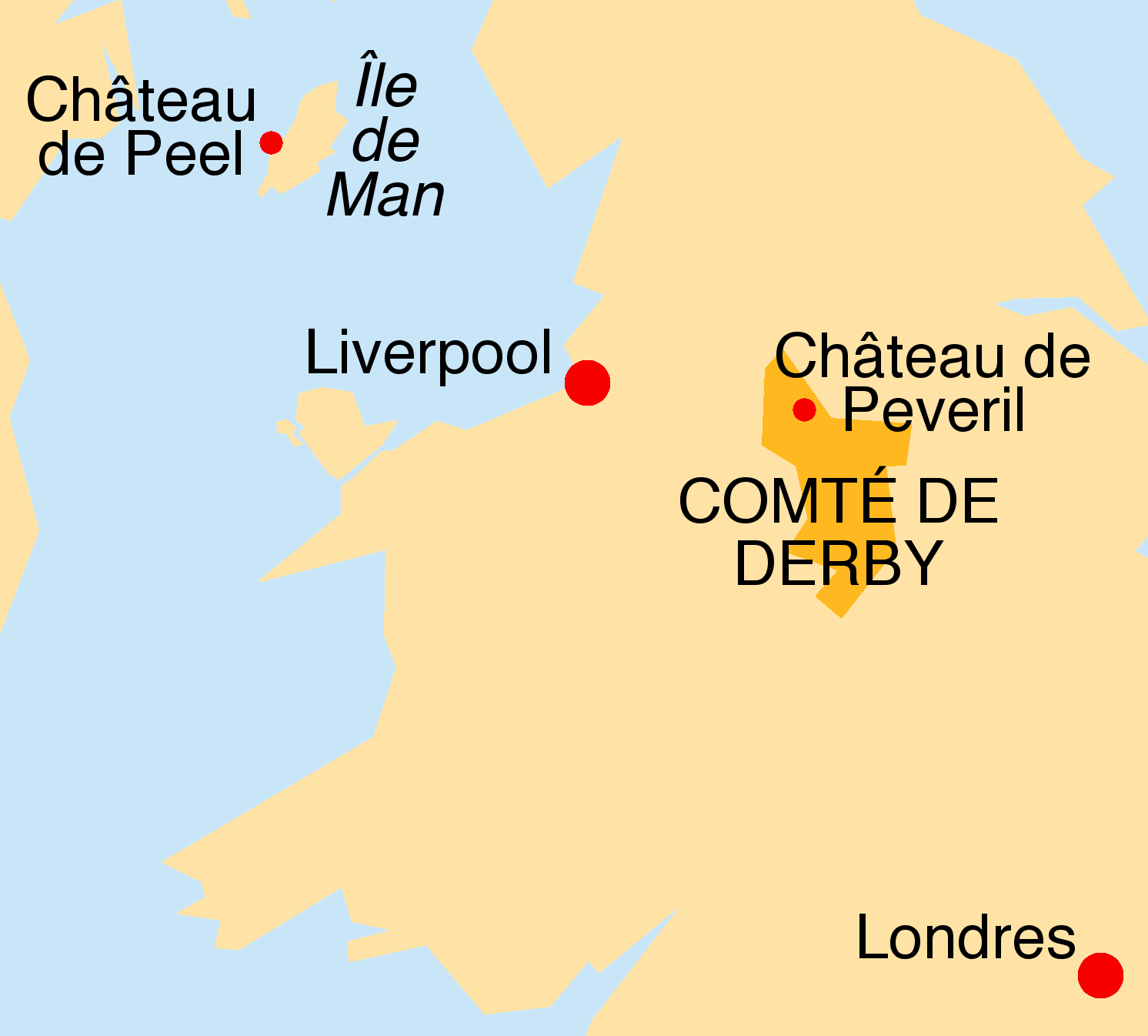 Lieux du roman historique Peveril du Pic de Walter Scott. Croquis très simplifié, d'après Derbyshire in England (+ceremonial areas).svg de TUBS, 2011.